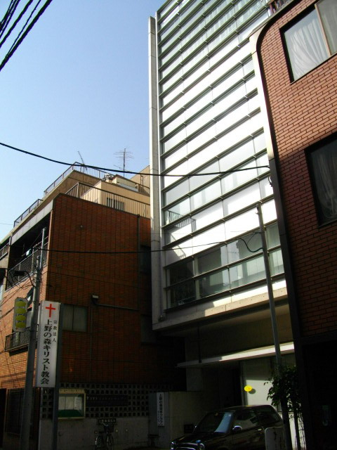 JTJ宣教神学校・ムラサキスポーツビル（東京都台東区）